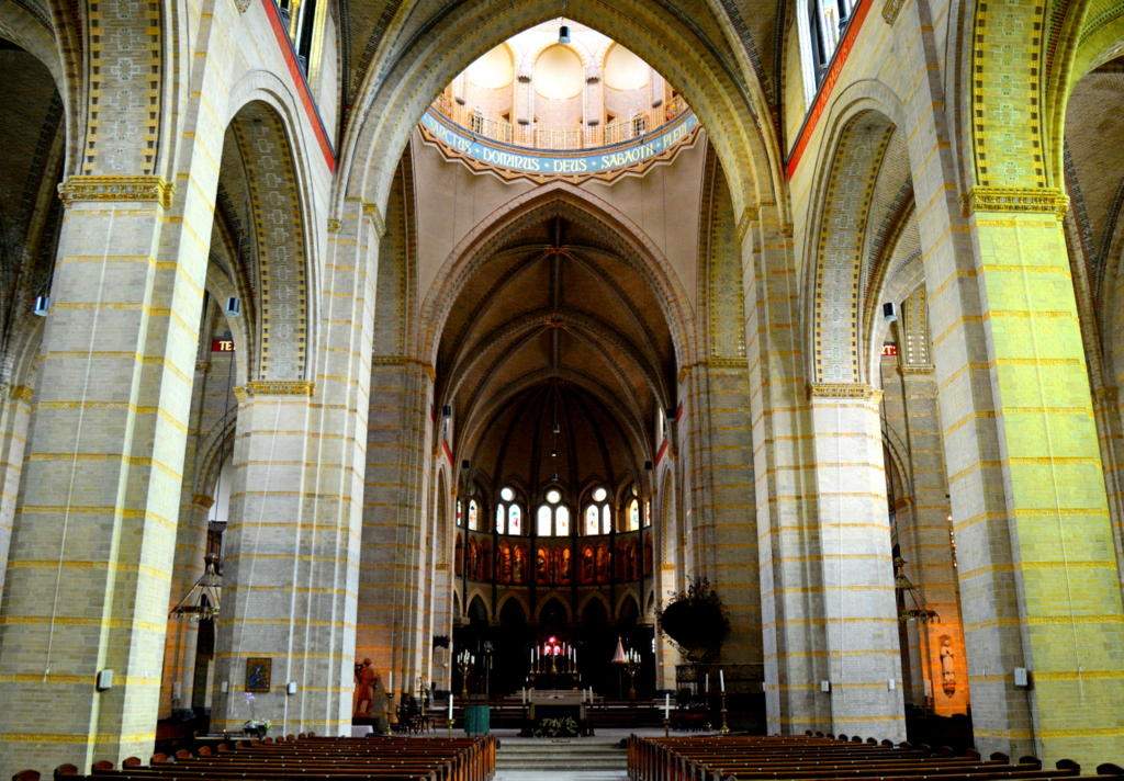 Haarlim, Sint-Bavokatedraal, oersjoch ynterieur